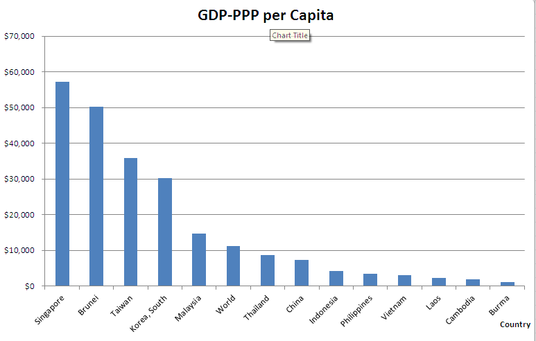 So sánh Thu nhập bình quân đầu người (tính theo sức mua)giữa Việt Nam và một số nước trong khu vực vào thời điểm ngày 01 tháng 07 năm 2008-2010 tương ứng. Số liệu lấy từ CIA World Factbook.